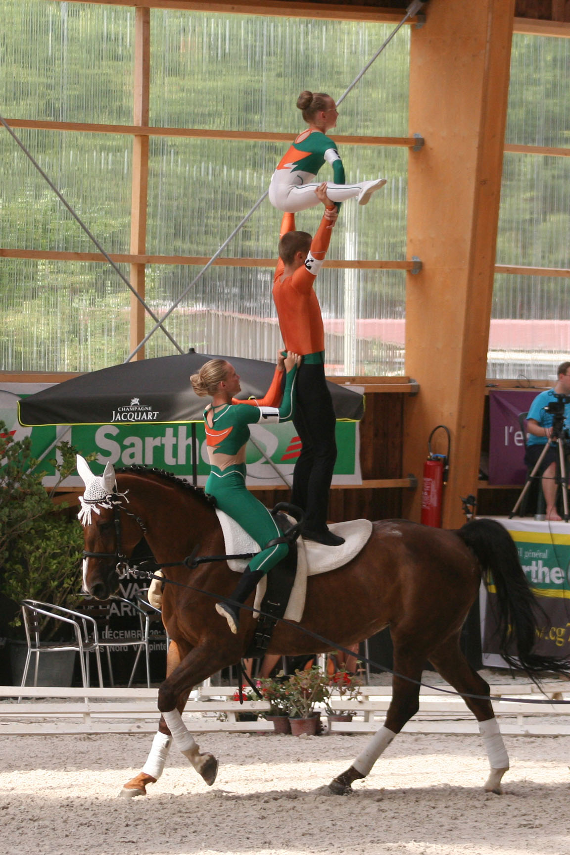 Вольтижировка. Групповое выступление. Произвольная программа.